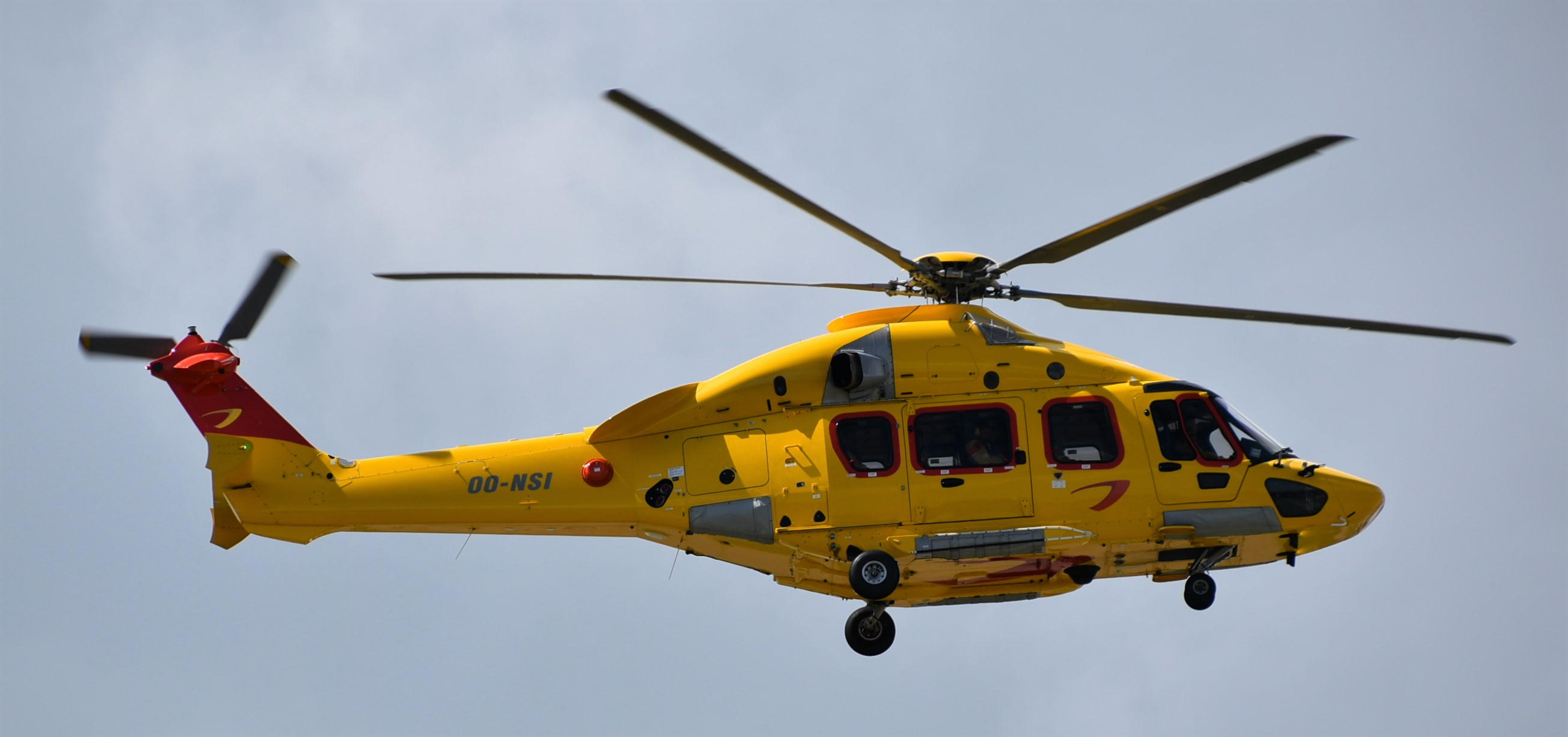 Airbus Helicopters EC-175B of NHV-Noordzee Helikopters Vlaanderen at Aberdeen-ABZ, 08/08/17.